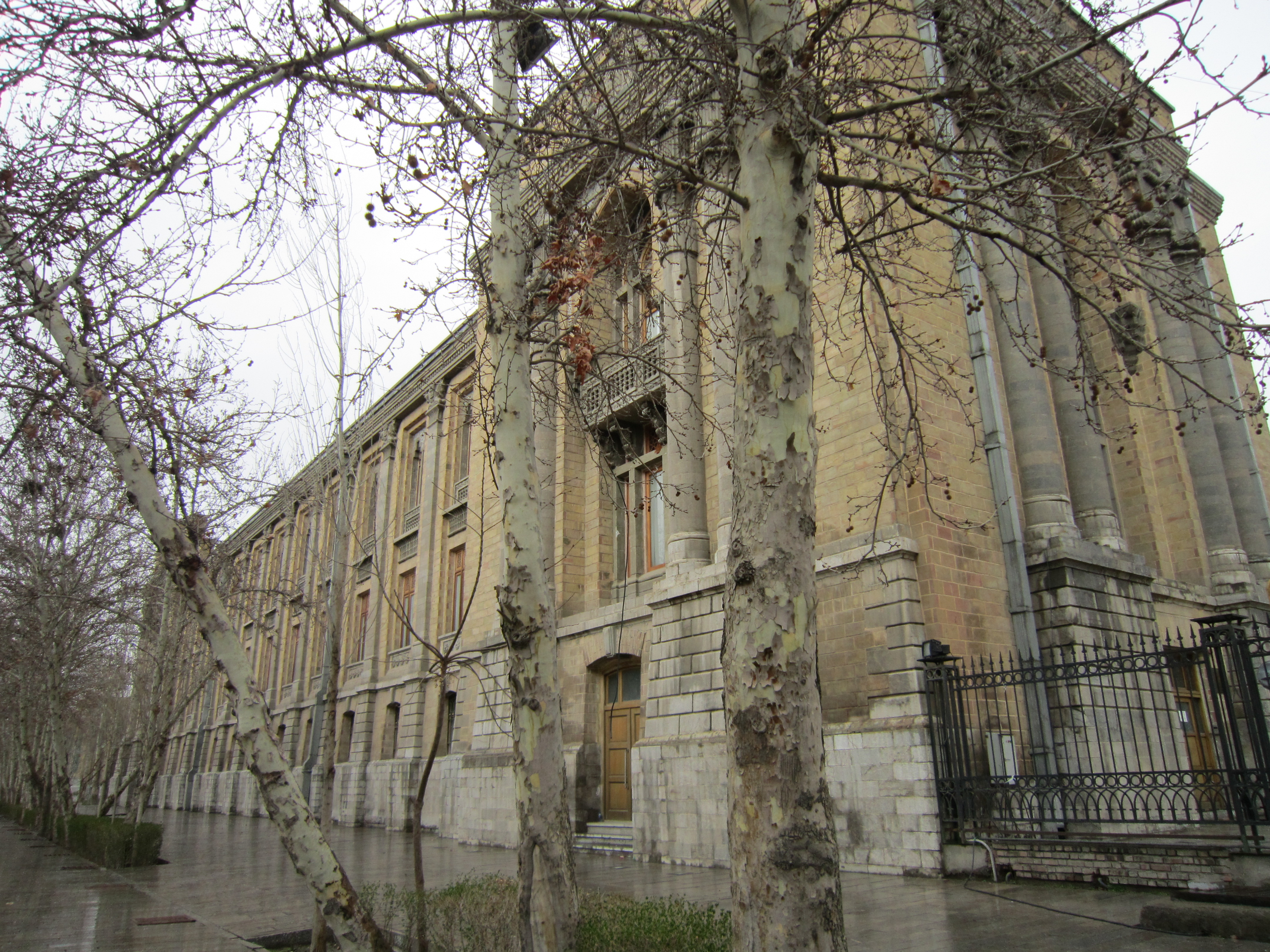 ساختمان وزارت امور خارجه